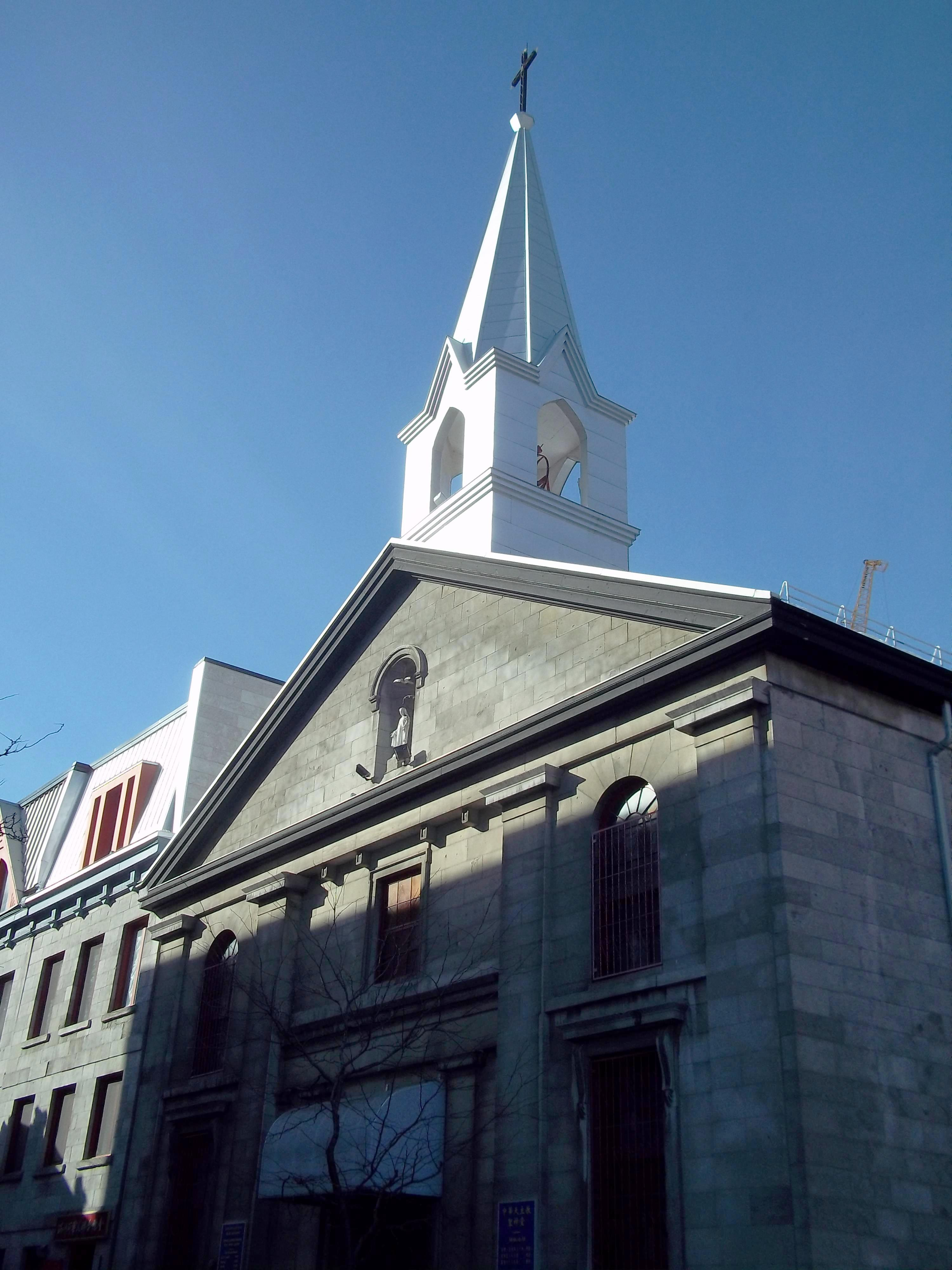 Église de la Mission-Catholique-Chinoise-du-Saint-Esprit, 205-211, rue De La Gauchetière Ouest, Montréal. (info)